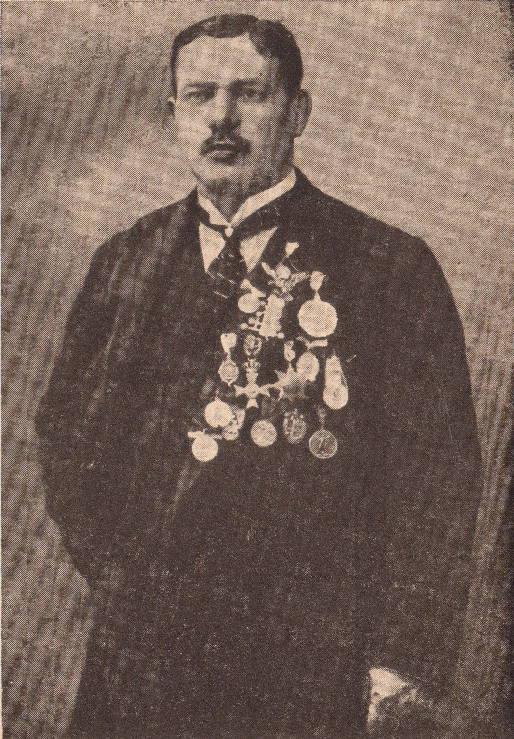 Aleksander Schneider, raskejõustiklane